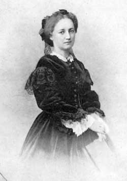 Анна Федоровна Тютчева (1829-1889)